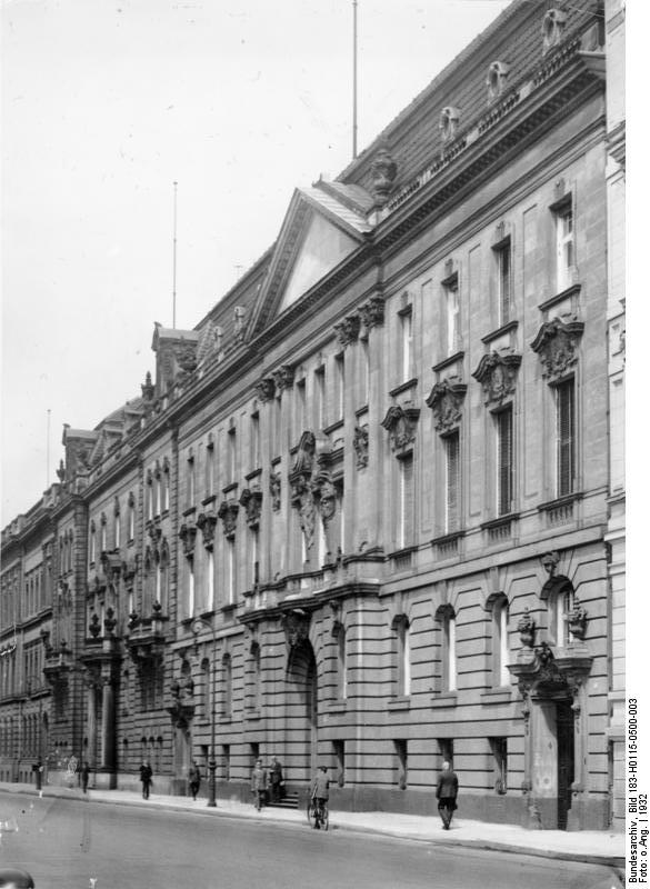 Zentralbild-Archiv Berlin 1932 Das Preußische Staatsministerium in der Wilhelmstraße 63/64. [Scherl Bilderdienst]